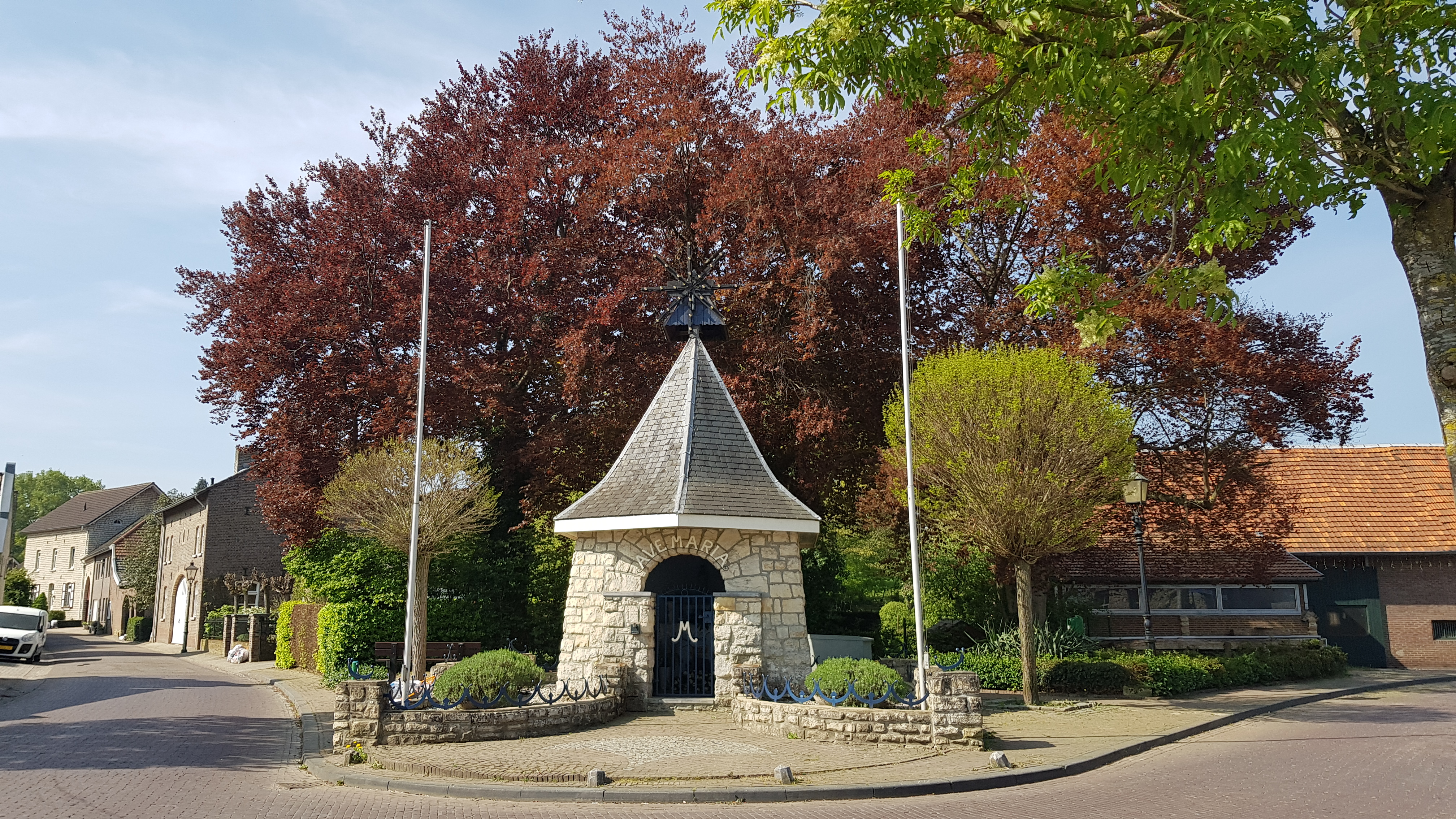 Kapel Craubekerstraat, Klimmen, Limburg, Nederland